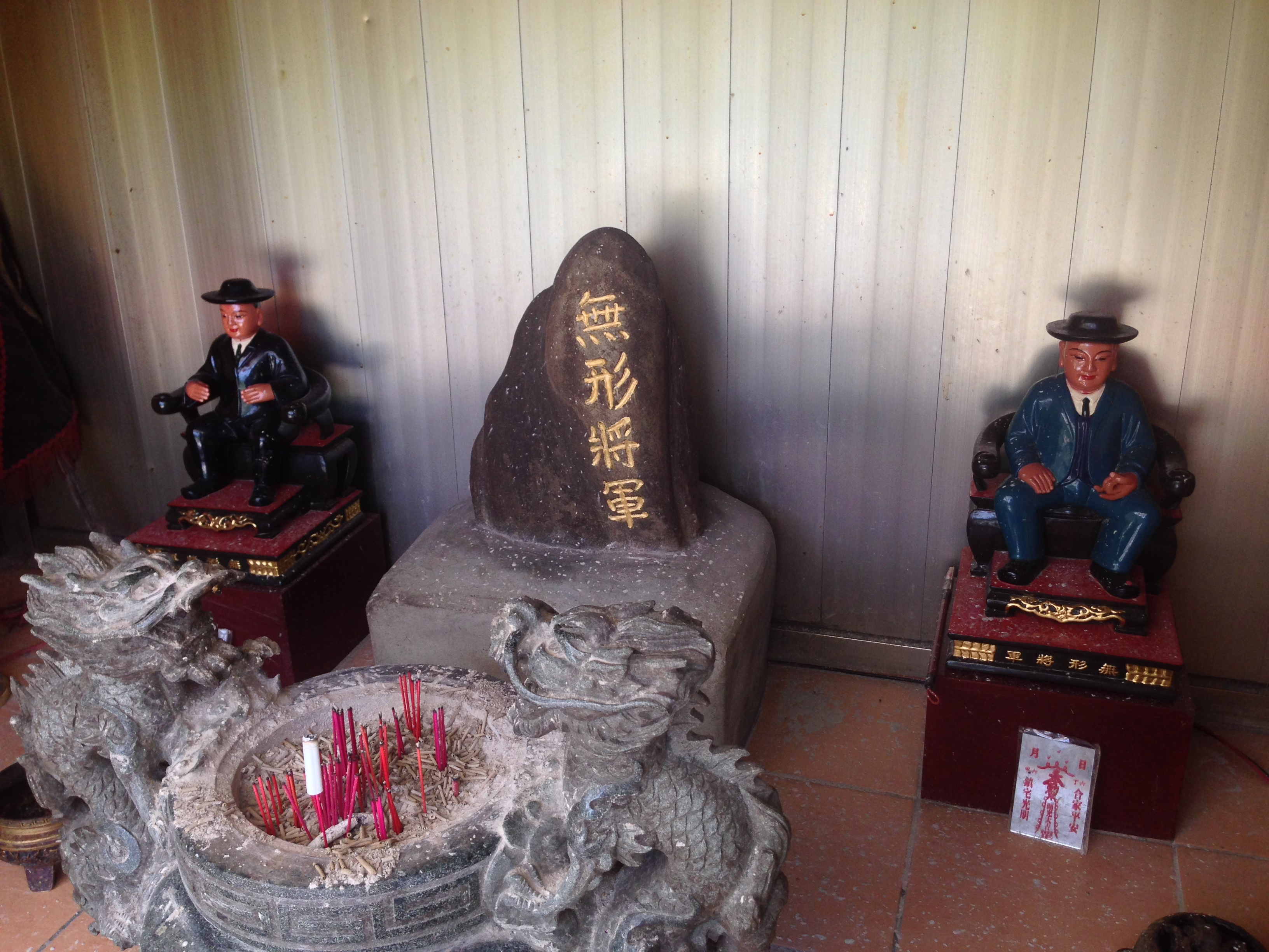 中文（台灣）: 無形將軍神像